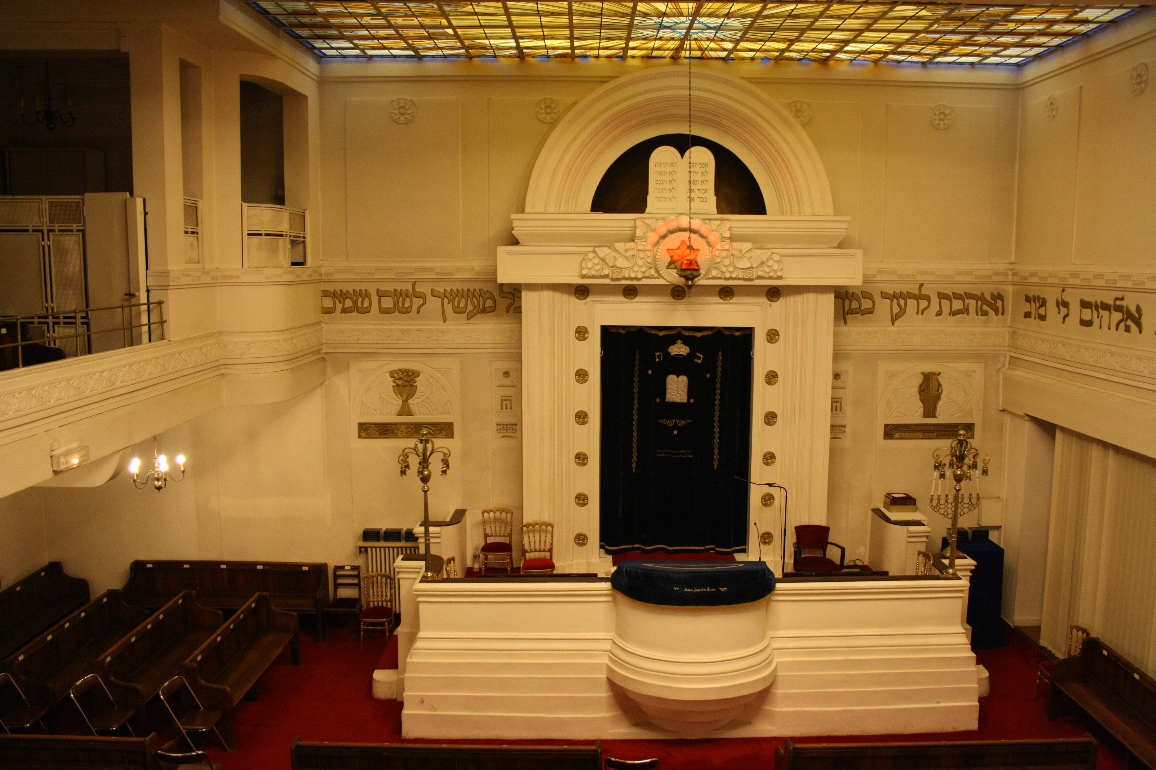 Synagoge der Rue Copernic (auch Synagoge der Union Libérale Israélite de France genannt), 24, rue Copernic, im 16. Arrondissement von Paris, Innenraum mit Blick auf Bima und Toraschrein